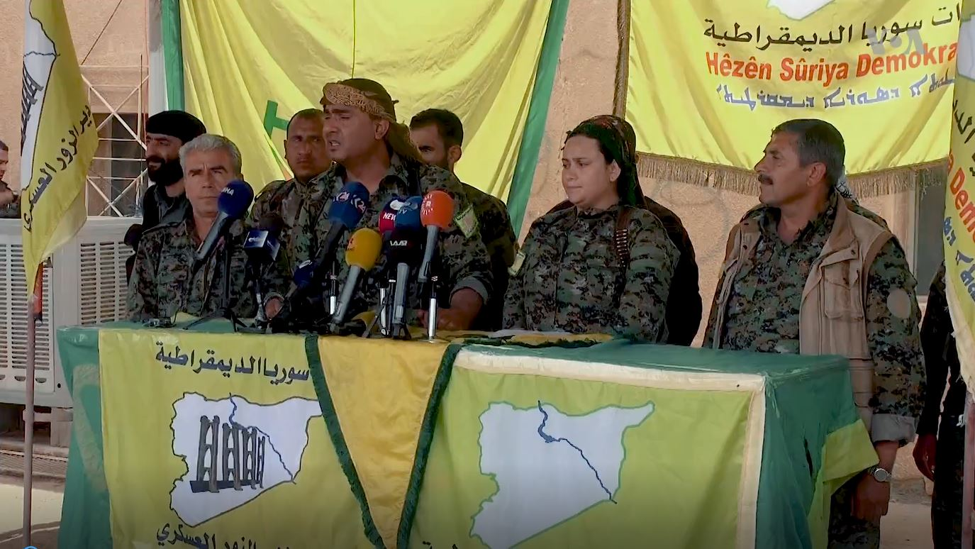 Conférence des Forces démocratiques syriennes dans la région de Deir ez-Zor annonçant une offensive contre l'Etat islamique, 2 mai 2018.